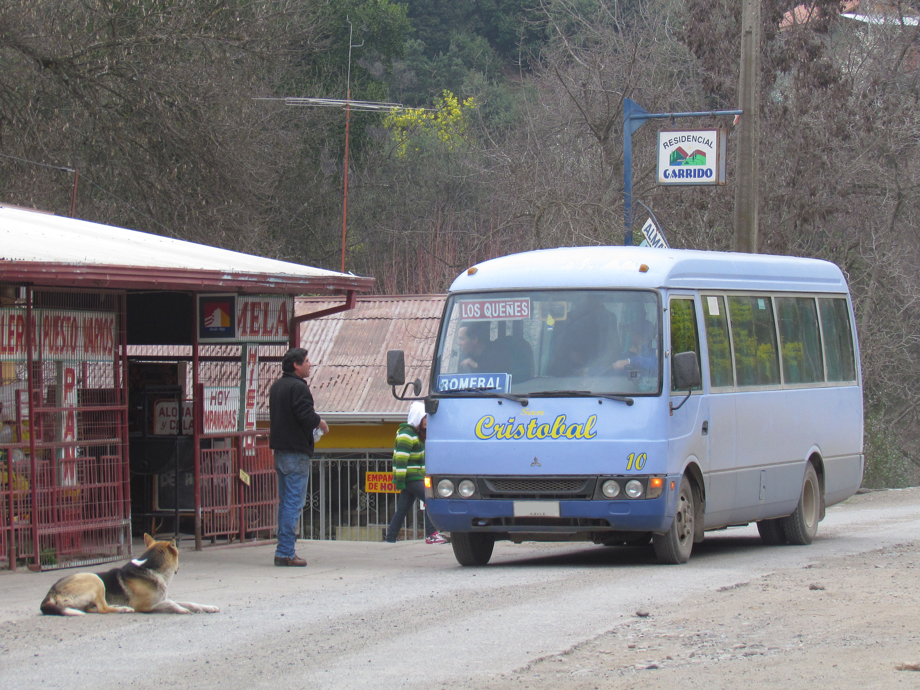 Rosa llegando a Los Queñes